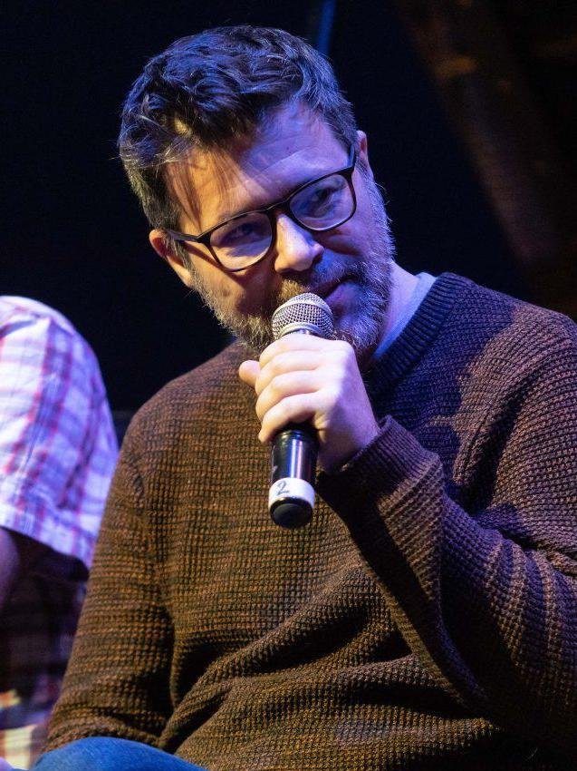 ¿Es el arte terreno únicamente para entendidos? ¿Es posible llorar de risa y de emoción al mismo tiempo hablando de arte? ¿Puede ser el humor un canal de acceso a las disciplinas artísticas? A estas y a muchas otras cuestiones responderá Duólogos, un “ciclo de alto voltaje para acercarnos al arte sin perecer en el intento”. Una serie de conversaciones protagonizadas por artistas de primer nivel y distintas disciplinas donde conversarán con algunos de los cómicos más destacados del país.